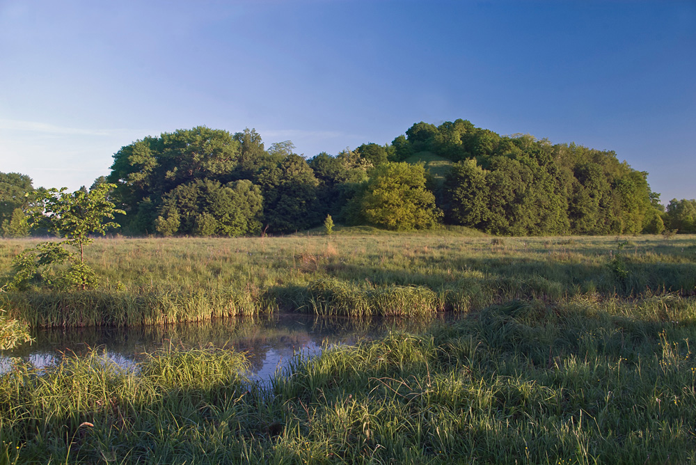 Данчичева гора, Срібнянський район, смт. Срібне